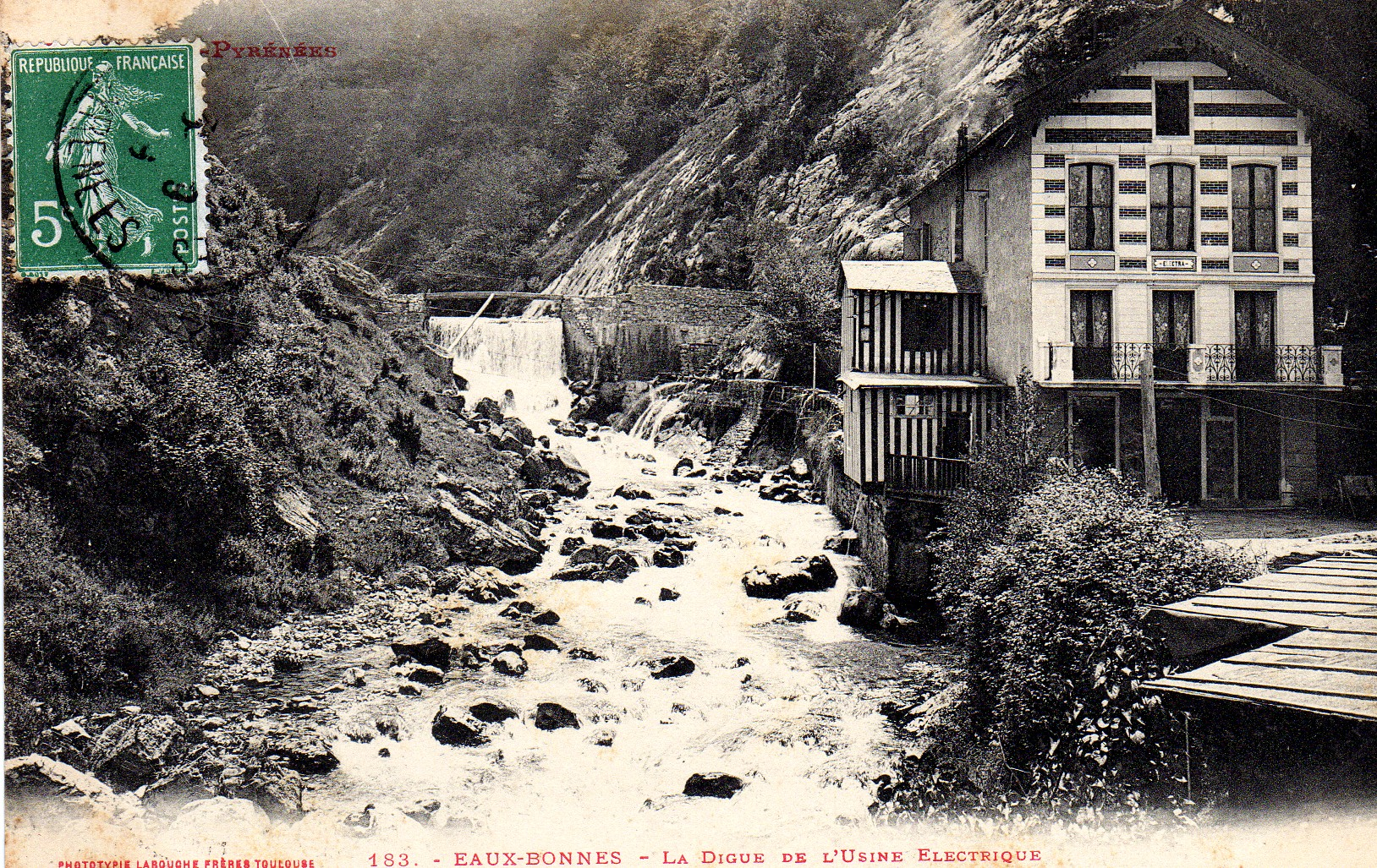 Digue et usine électrique - c1900 - Eaux-Bonnes - France